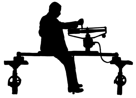 Einschienenbahn: RWP zeigt die Stabiliserung mithilfe eines Kreisels (Einschienenbahn) (R.W.Pohl, Mechanik, etc, alle Auflagen)